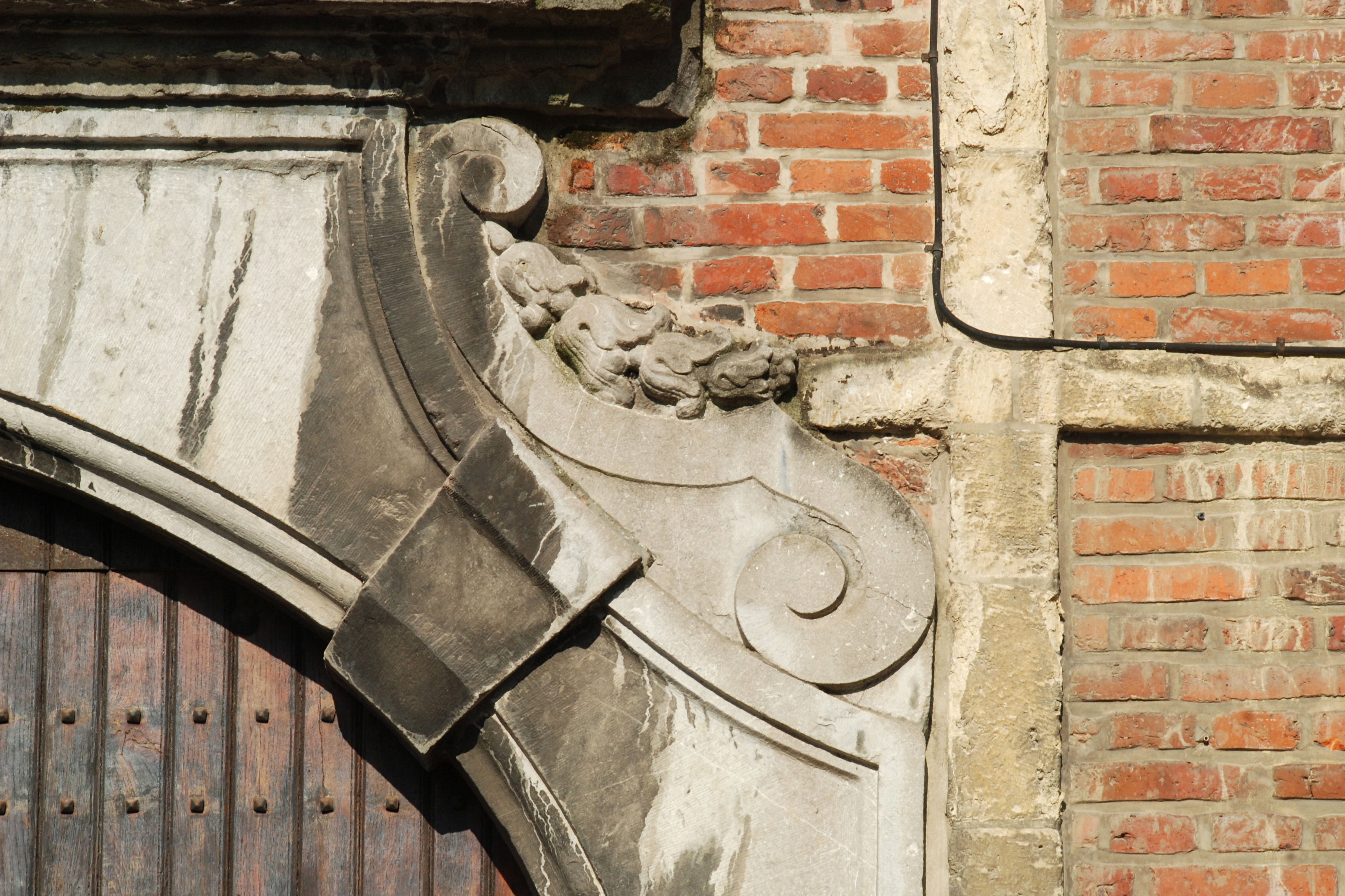 Belgique - Louvain - Brasserie de Jonge Sint-Jacob